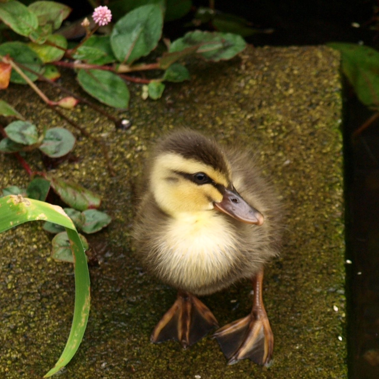 カルガモの雛